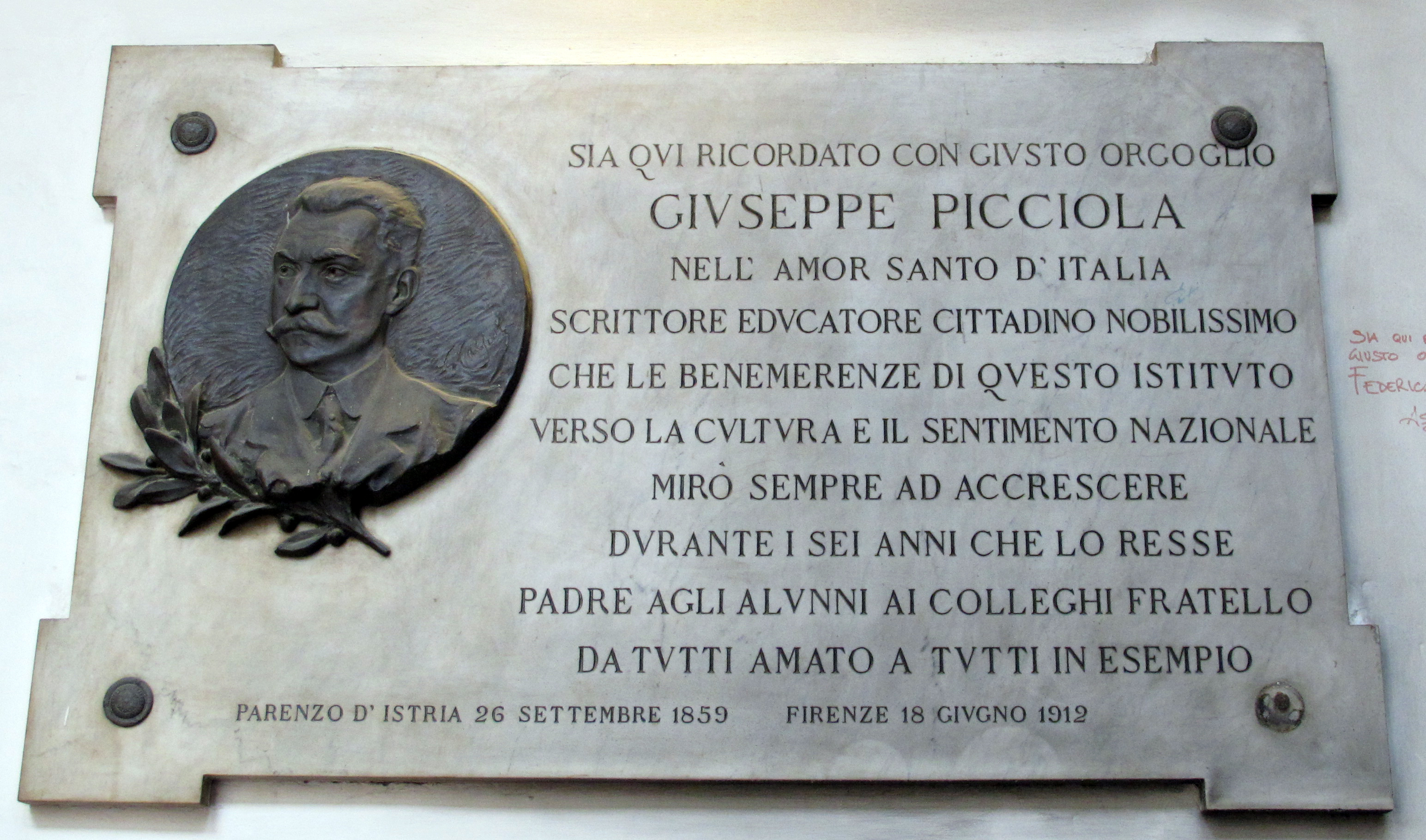 Palazzo Martelli (Scolopi), Firenze